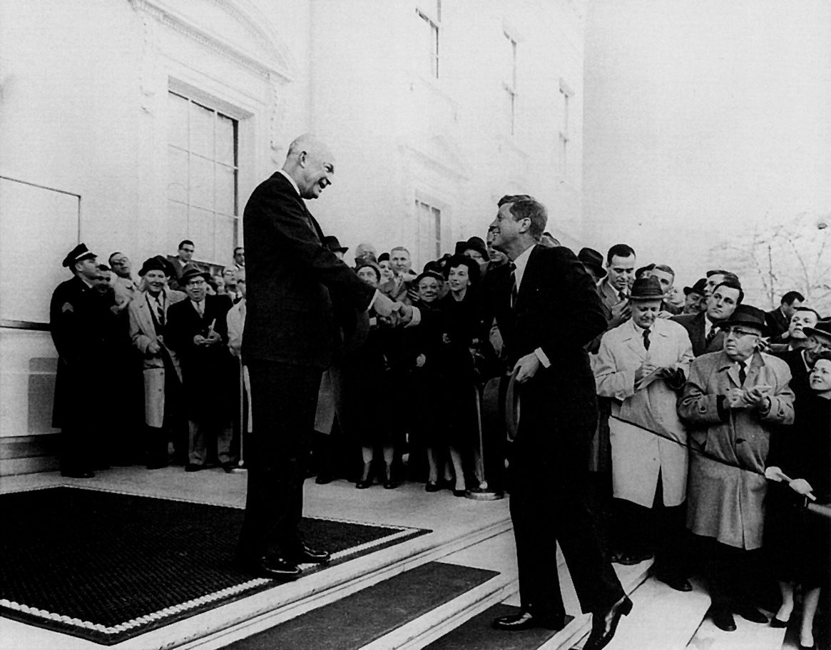 Eisenhower and President-elect John Fitzgerald Kennedy